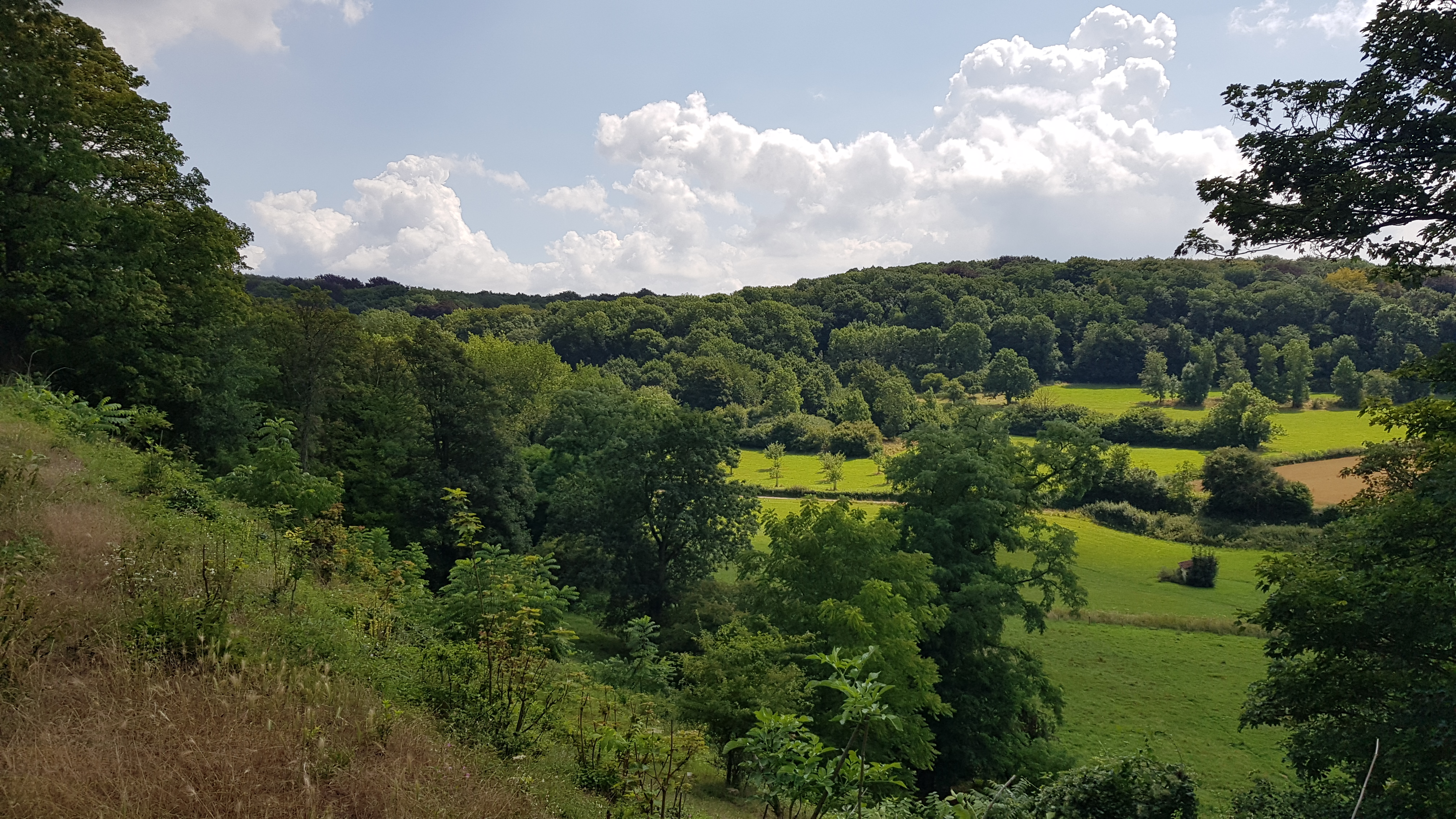 uitzicht vanaf Huis De Beuk in het Savelsbos, Gronsveld, Nederland